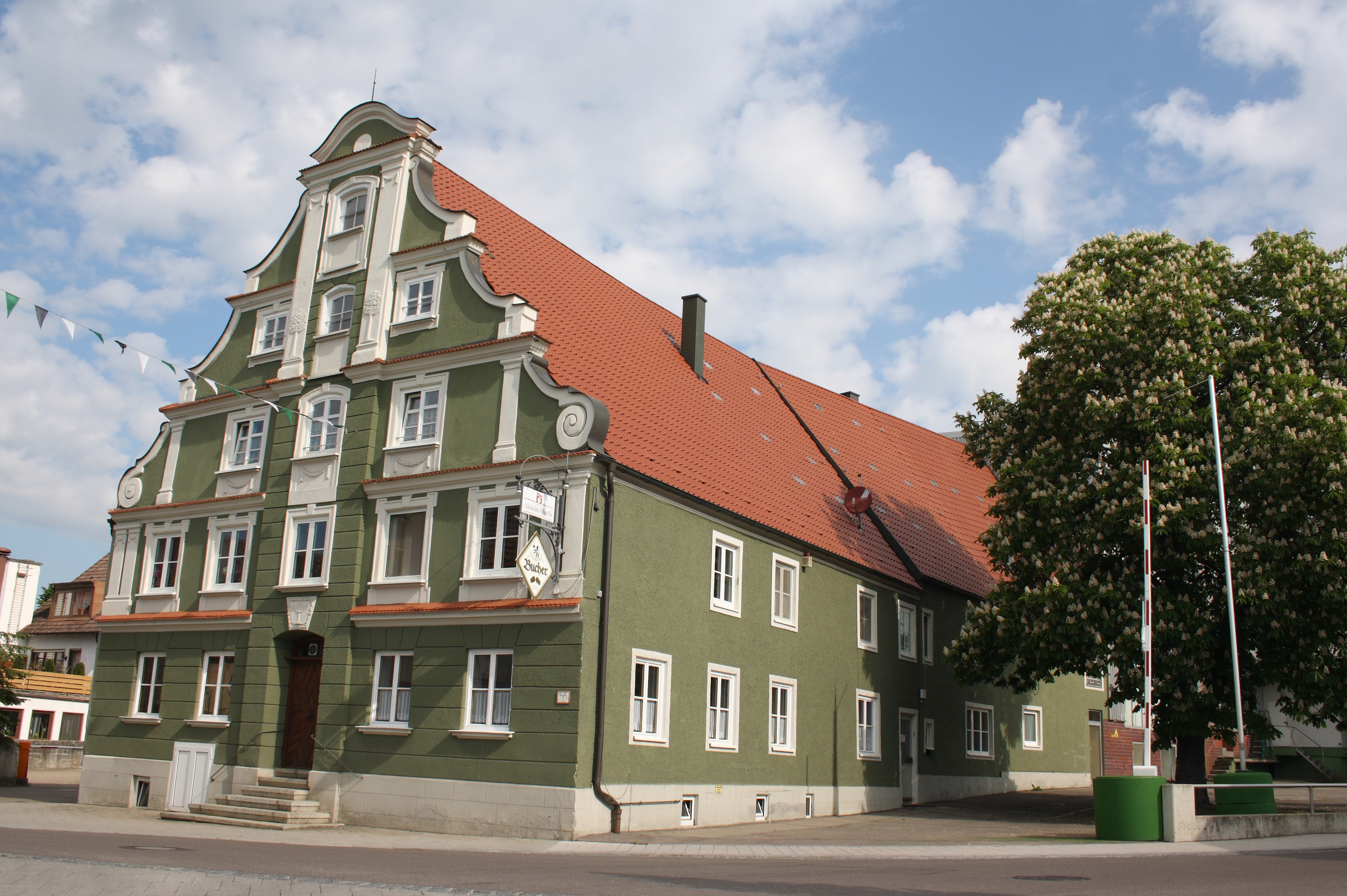 Brauerei-Gasthof Bucher in Gundelfingen an der Donau, Untere Vorstadt 17